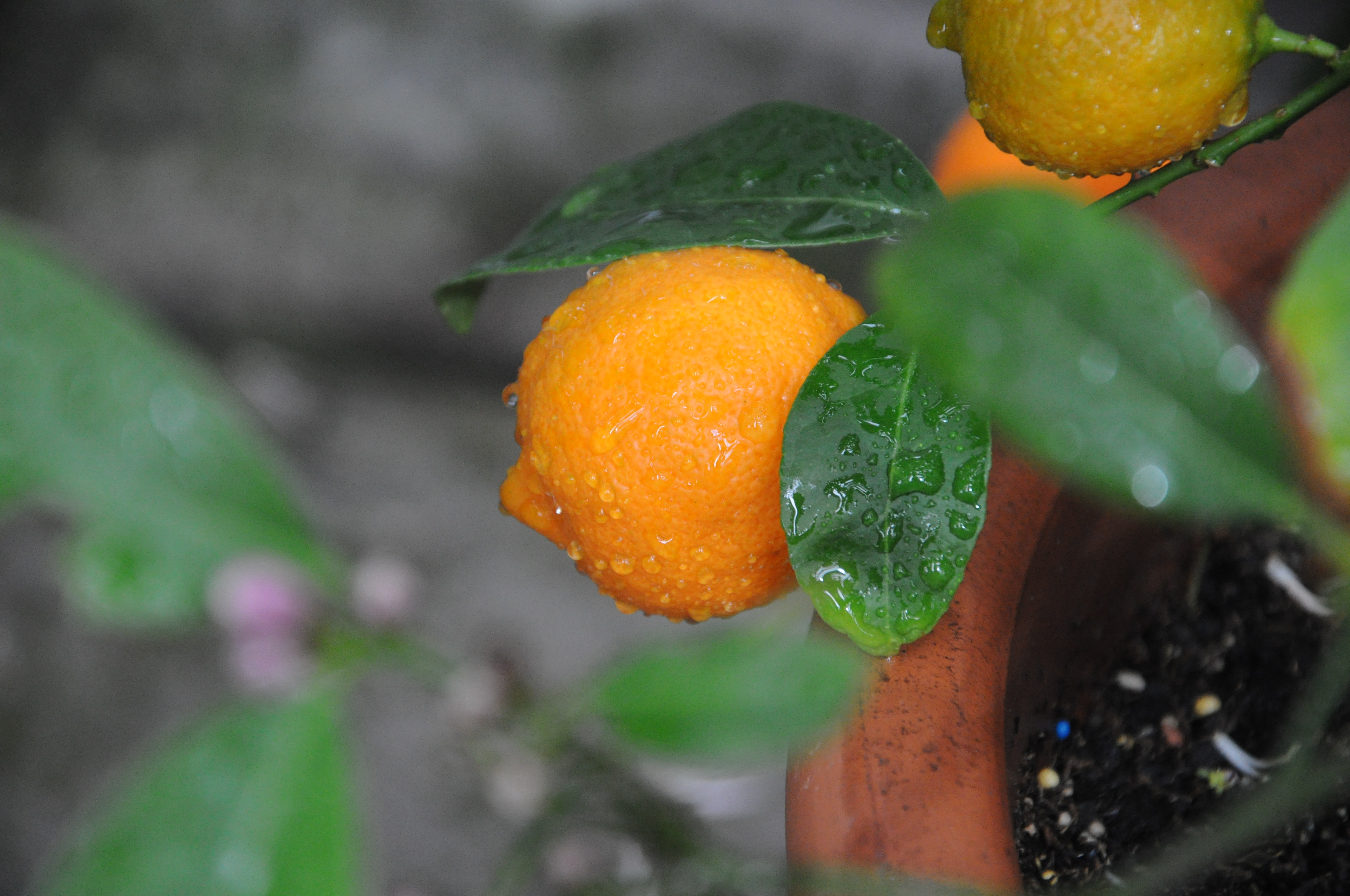 Citrus x limonia (Osbeck) Lemandrine 001.jpg